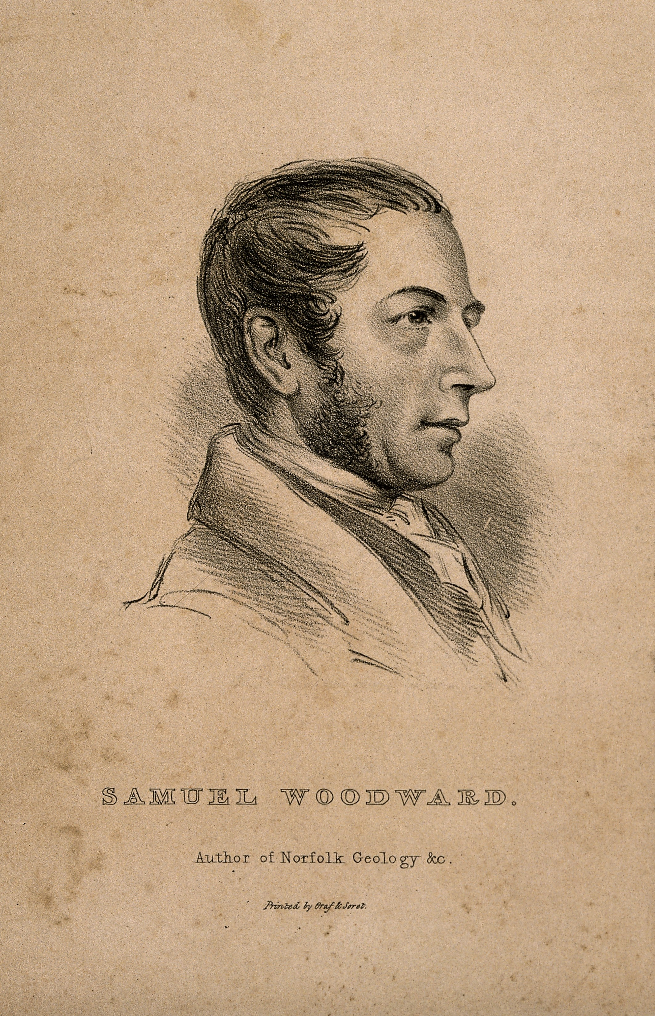 Genre/Technique: Portrait prints. Lithographs. Subject name: Woodward, Samuel, 1790-1838.